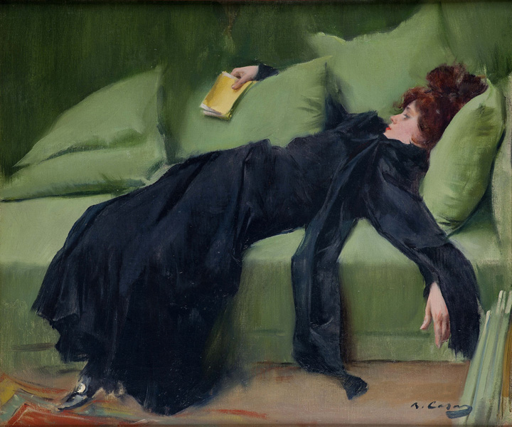 Catalan: Jove decadentlabel QS:Lca,"Jove decadent"